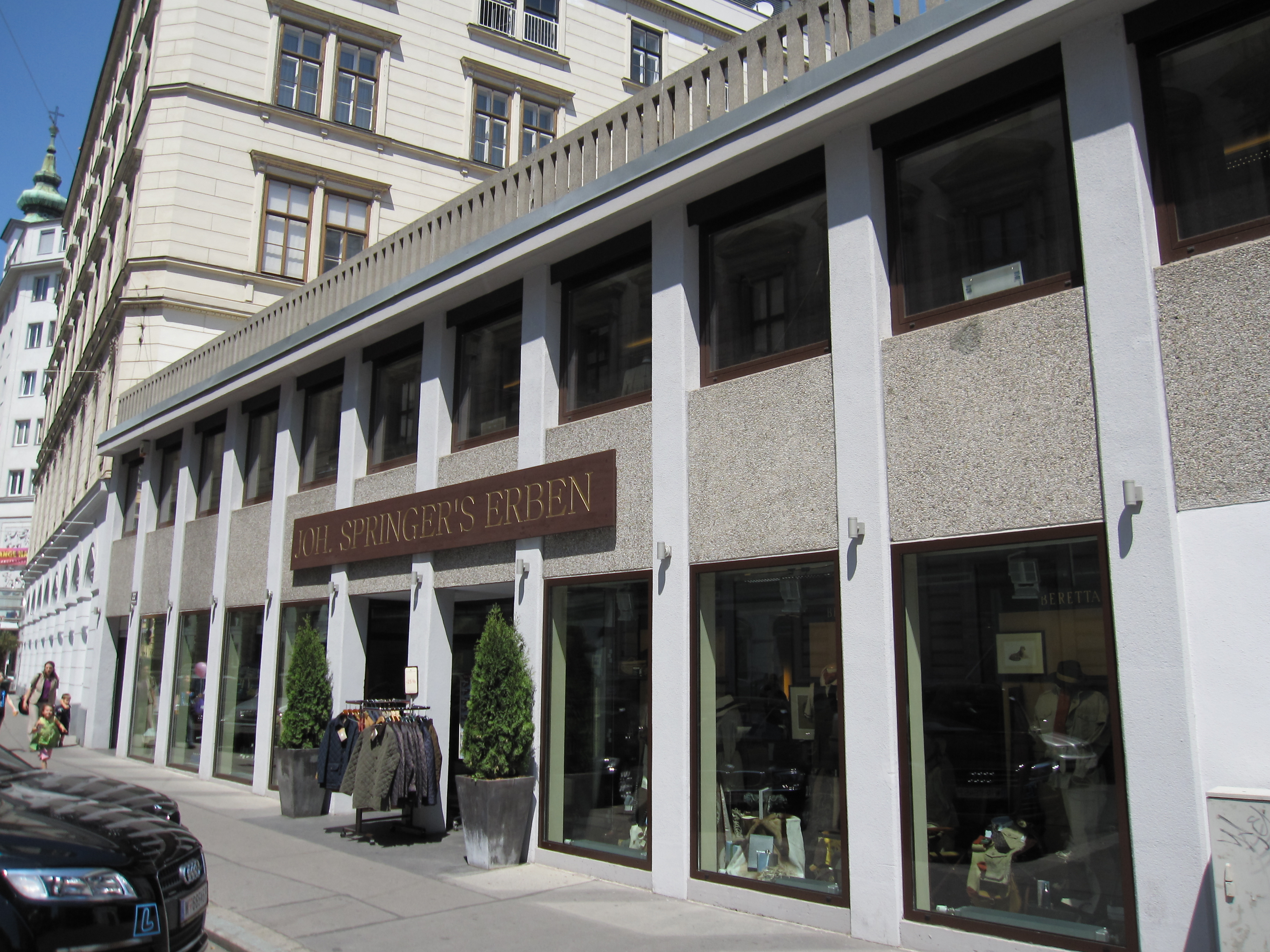 Joh. Springer’s Erben in Vienna's I. district.